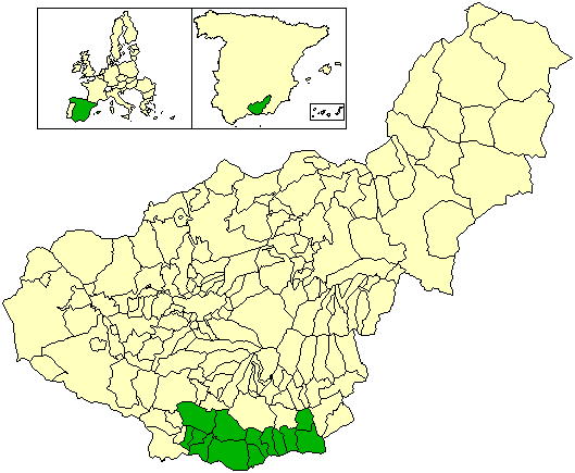 Mapa del partido judicial de Motril, en la provincia de Granada (España)